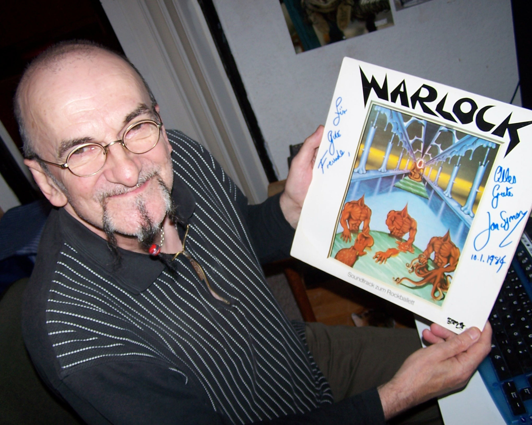 Jon Symon im Januar 2003 (mit der LP Warlock – The Rockballett von 1983) thumb|Original Uploaded with Reworkhelper